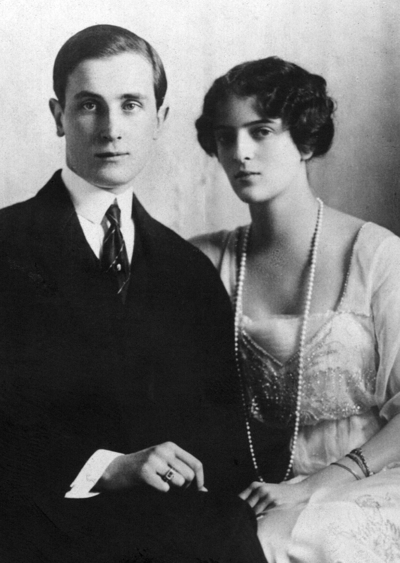 Prinz Felix Jussupow und seine Gemahlin, Prinzessin Irina von Russland